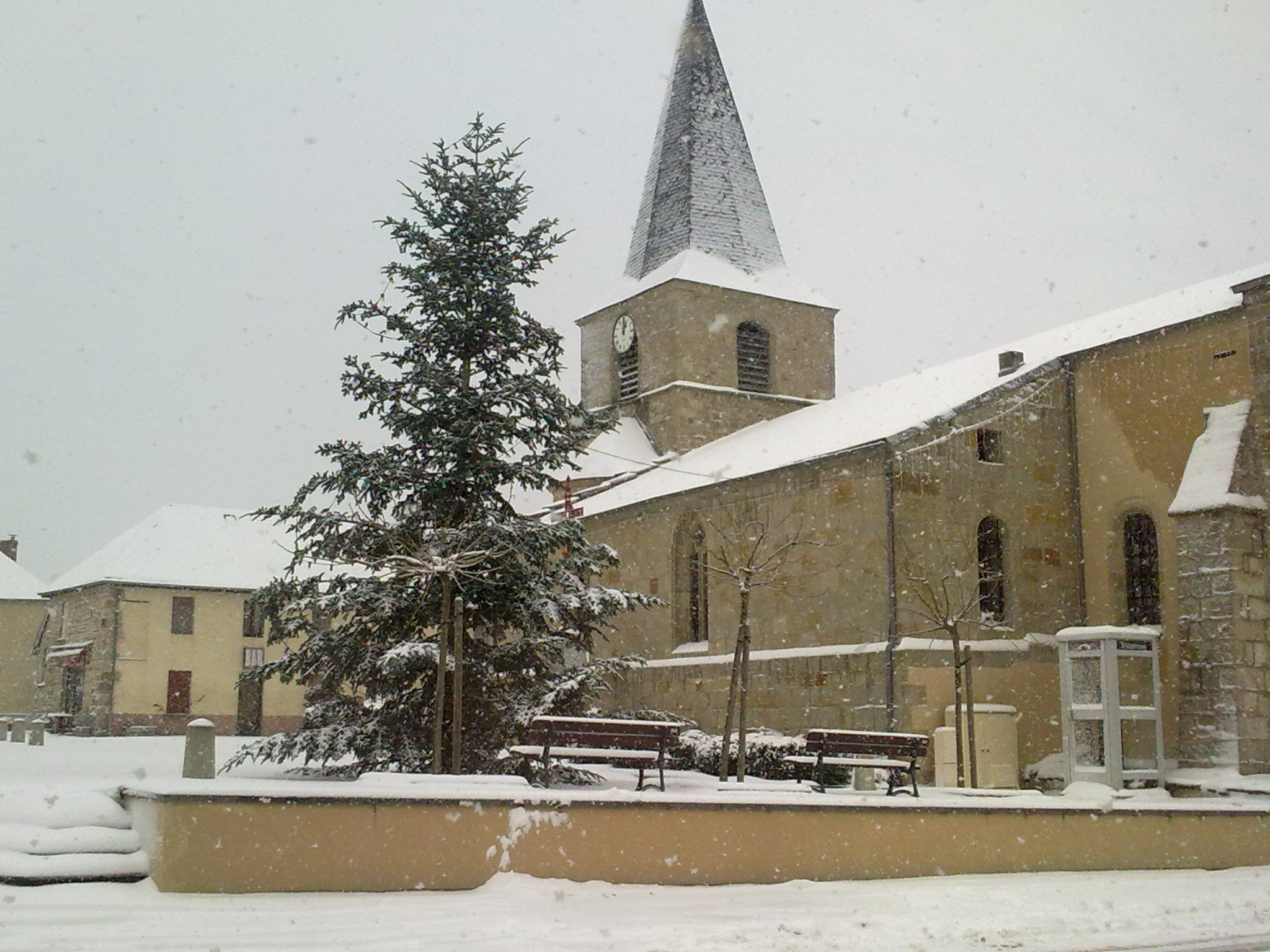 Le bourg d'Espinasse sous la neige.